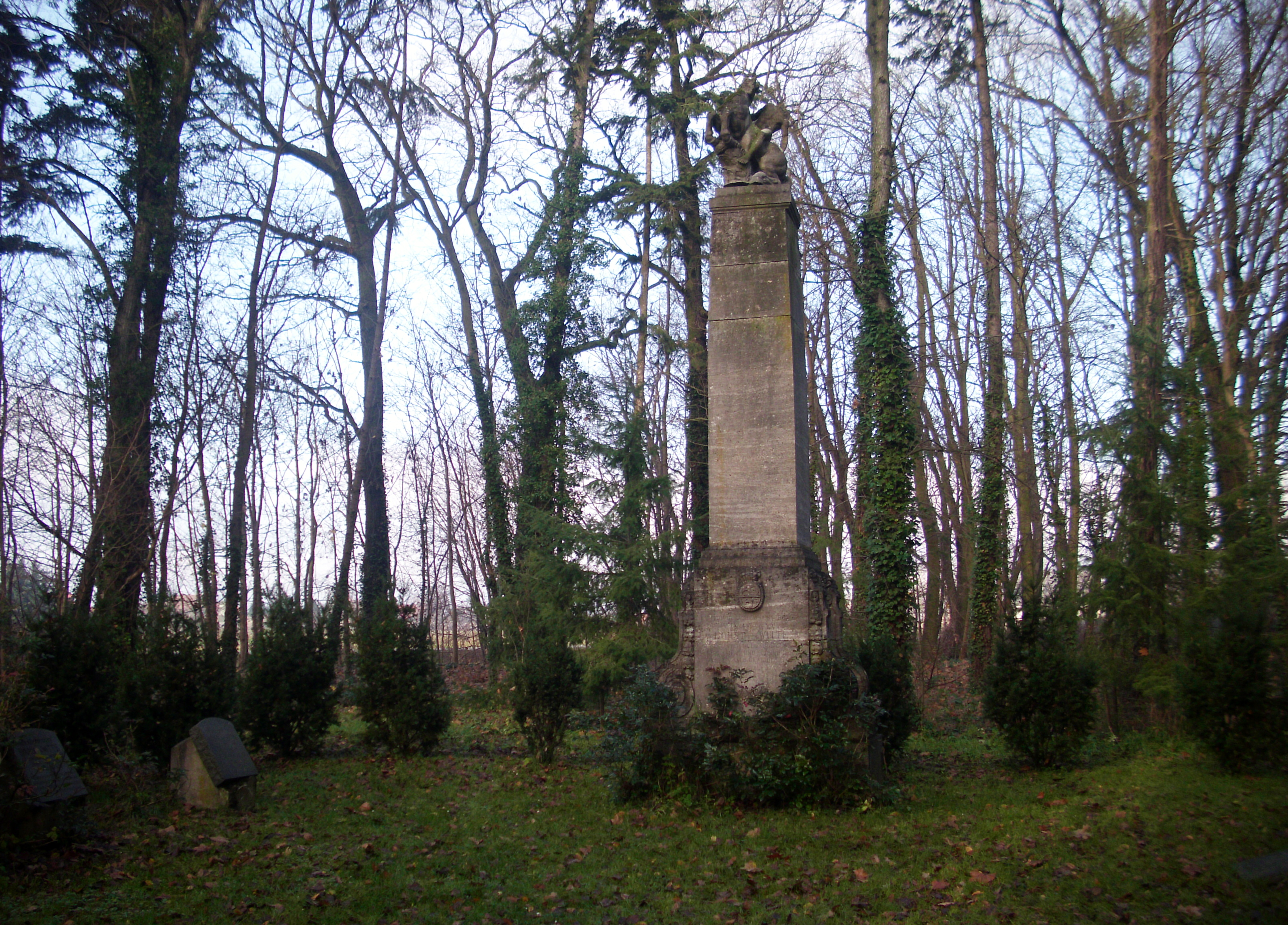 Familiengrab von Witte, Ragow, Gemeinde Ragow-Merz, Brandenburg